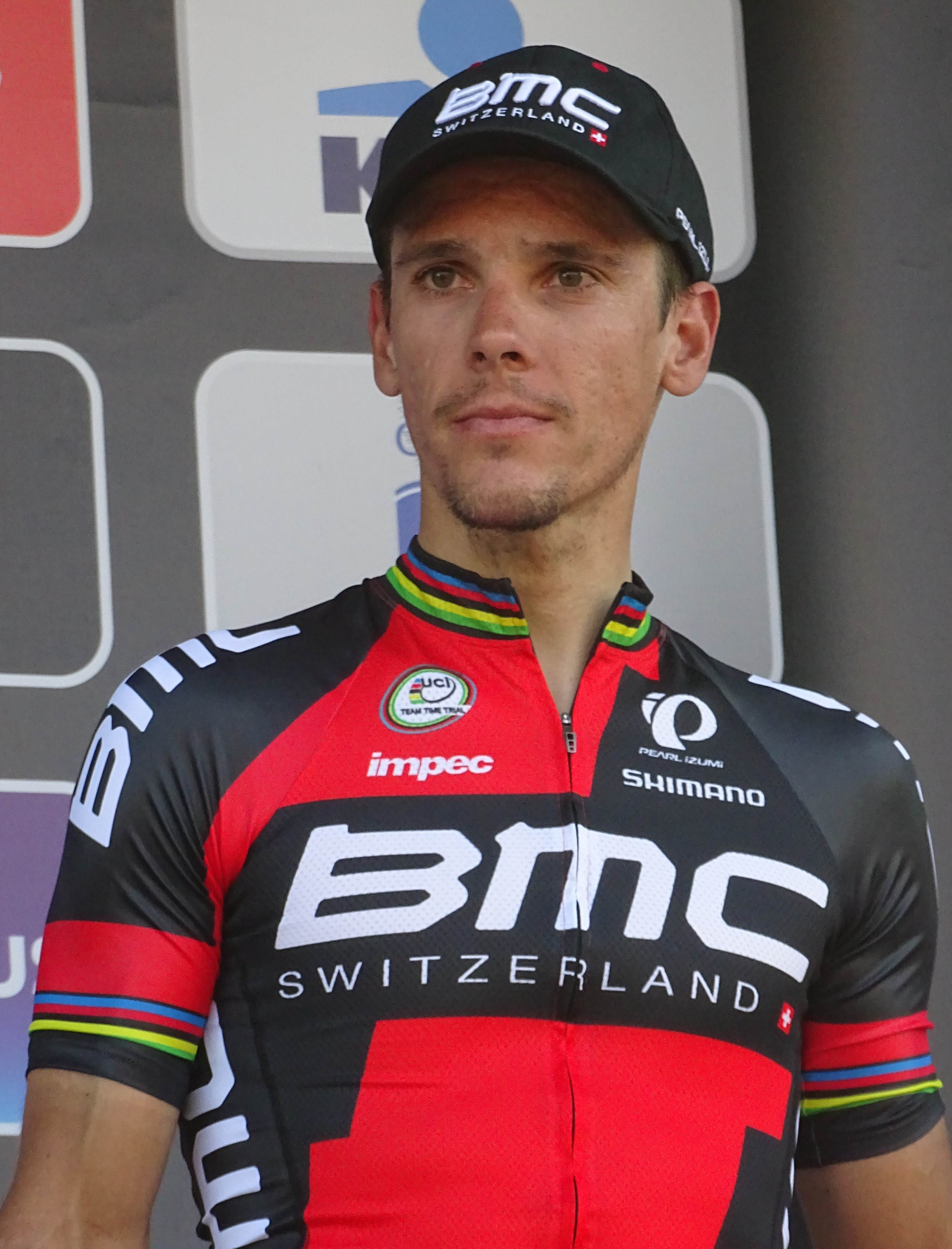 Reportage réalisé le mercredi 15 avril à l'occasion de l'arrivée de la Flèche brabançonne 2015 à Overijse, Belgique.